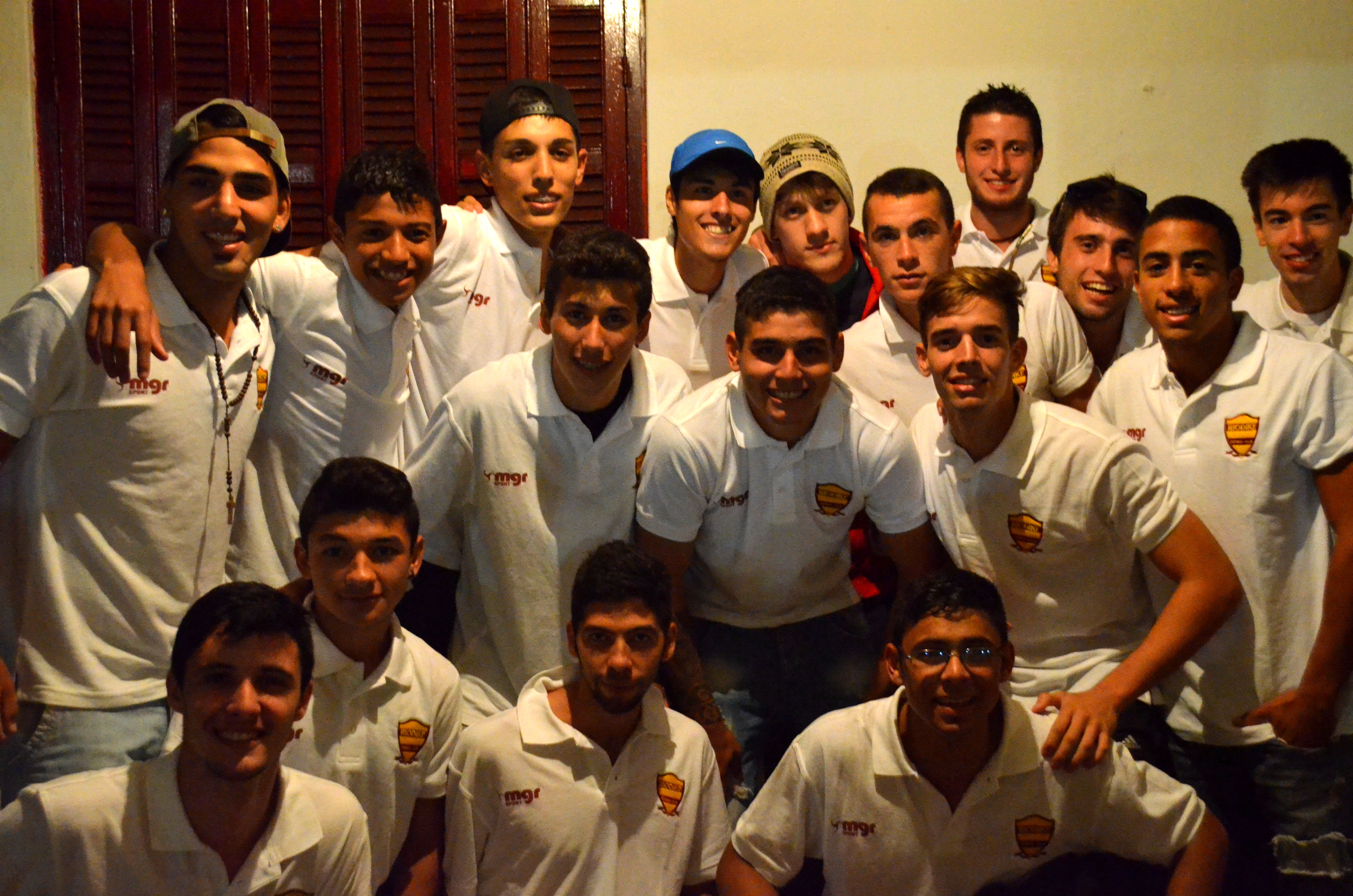 Foto del plantel del Riodike Fútbol Club posterior al enfrentamiento contra Independiente de Punta Valdéz en San José